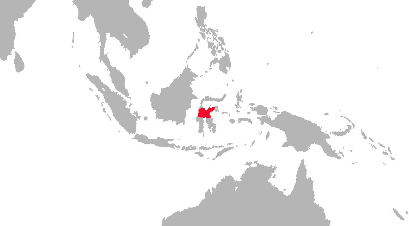 Carte de répartion du macaque de Tonkean. Etablie par Christophe Chauvin.